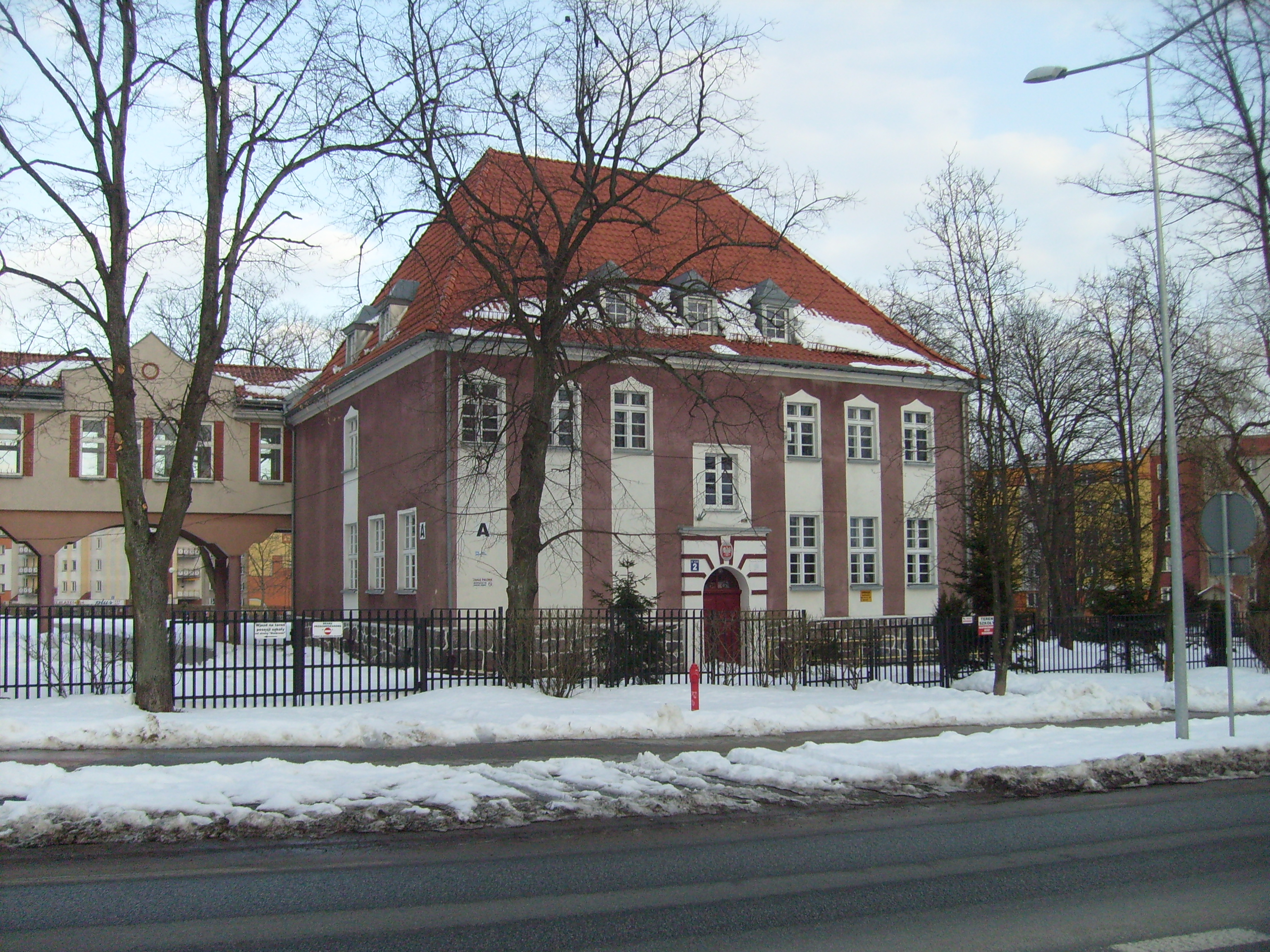 Budynek A Zespołu Szkół nr 6 im. Macieja Rataja w Ełku, stan na kwiecień 2013